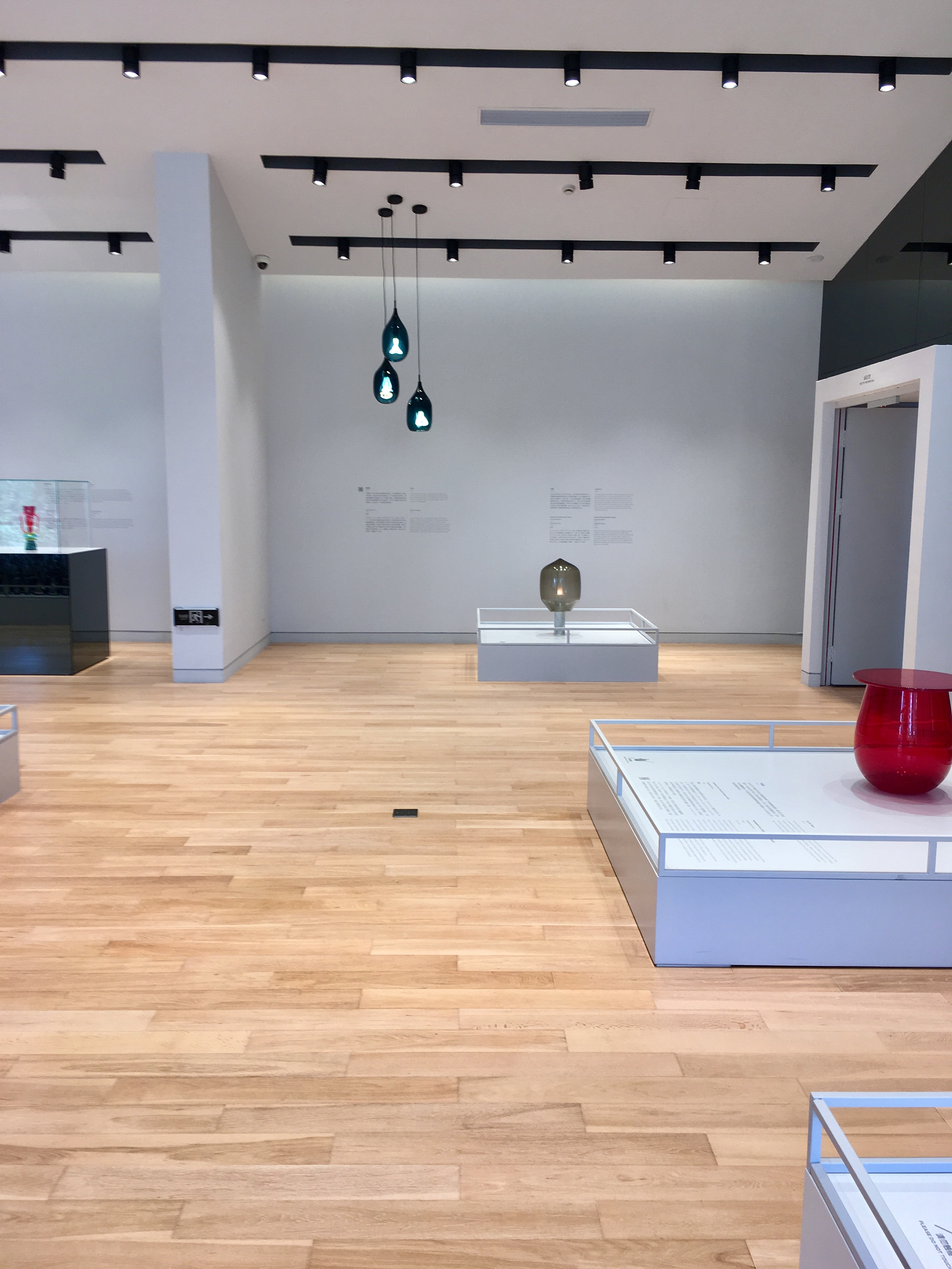 拍摄于2016年夏天，iPhone SE